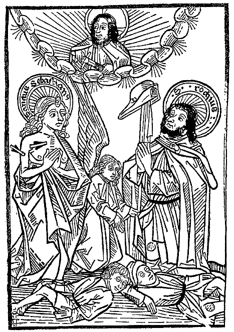 Augsburger Pestblatt. Staats- und Stadtbibliothek Augsburg